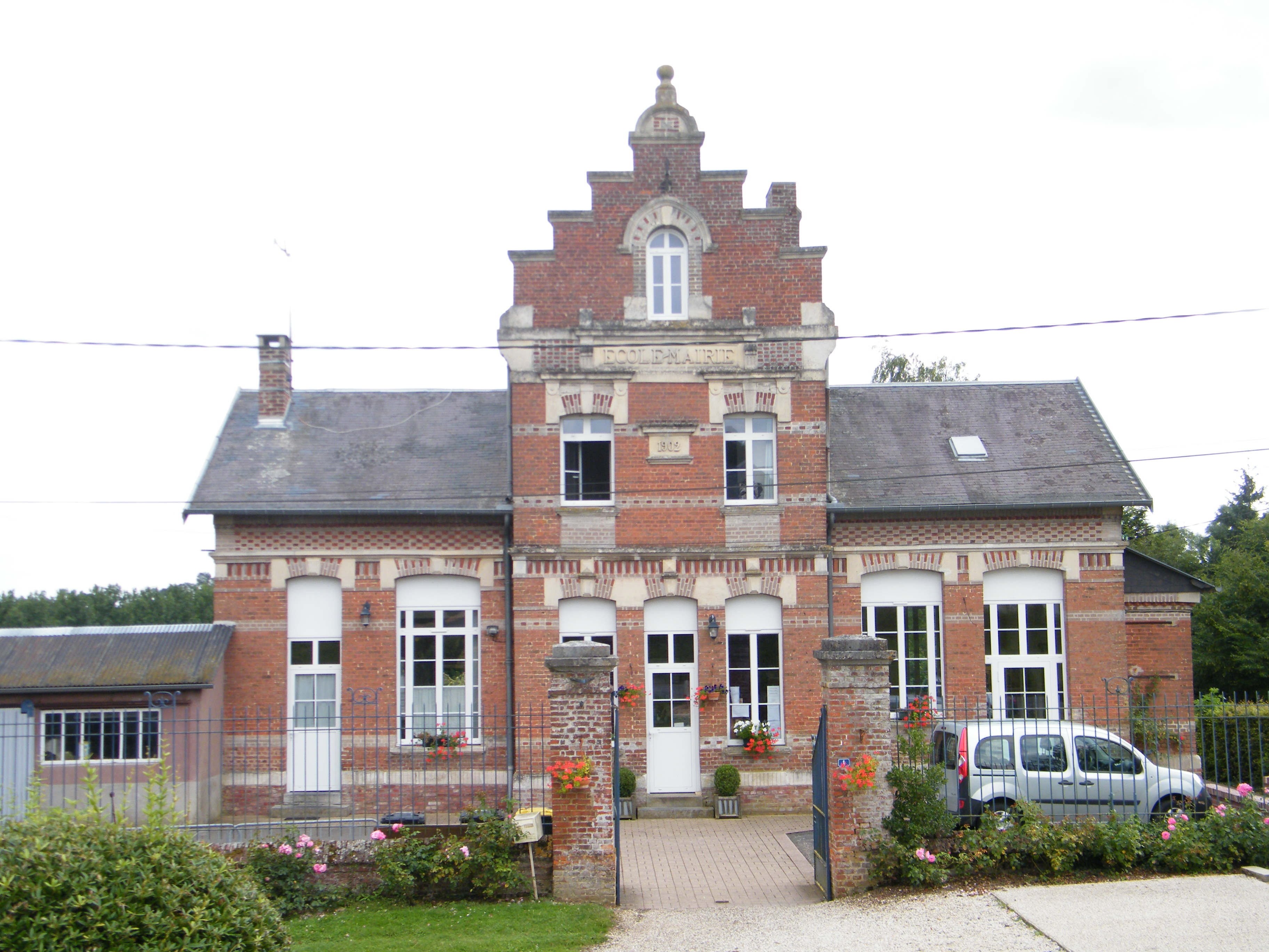 Mairie-école.